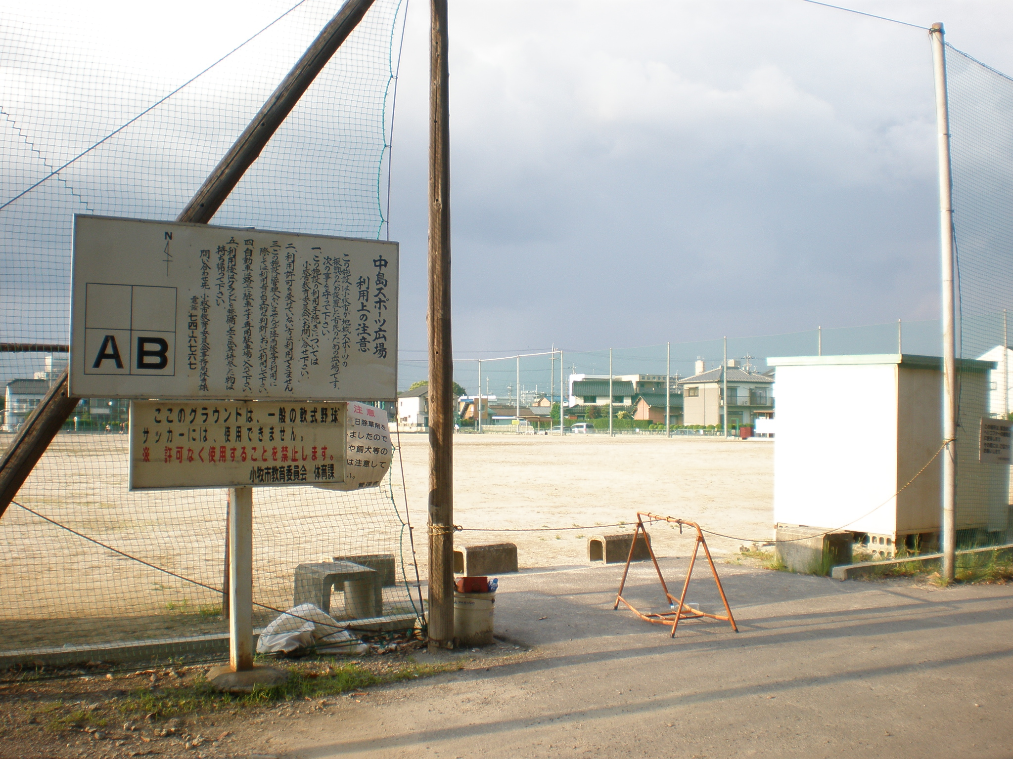 愛知県小牧市にある中島スポーツ広場